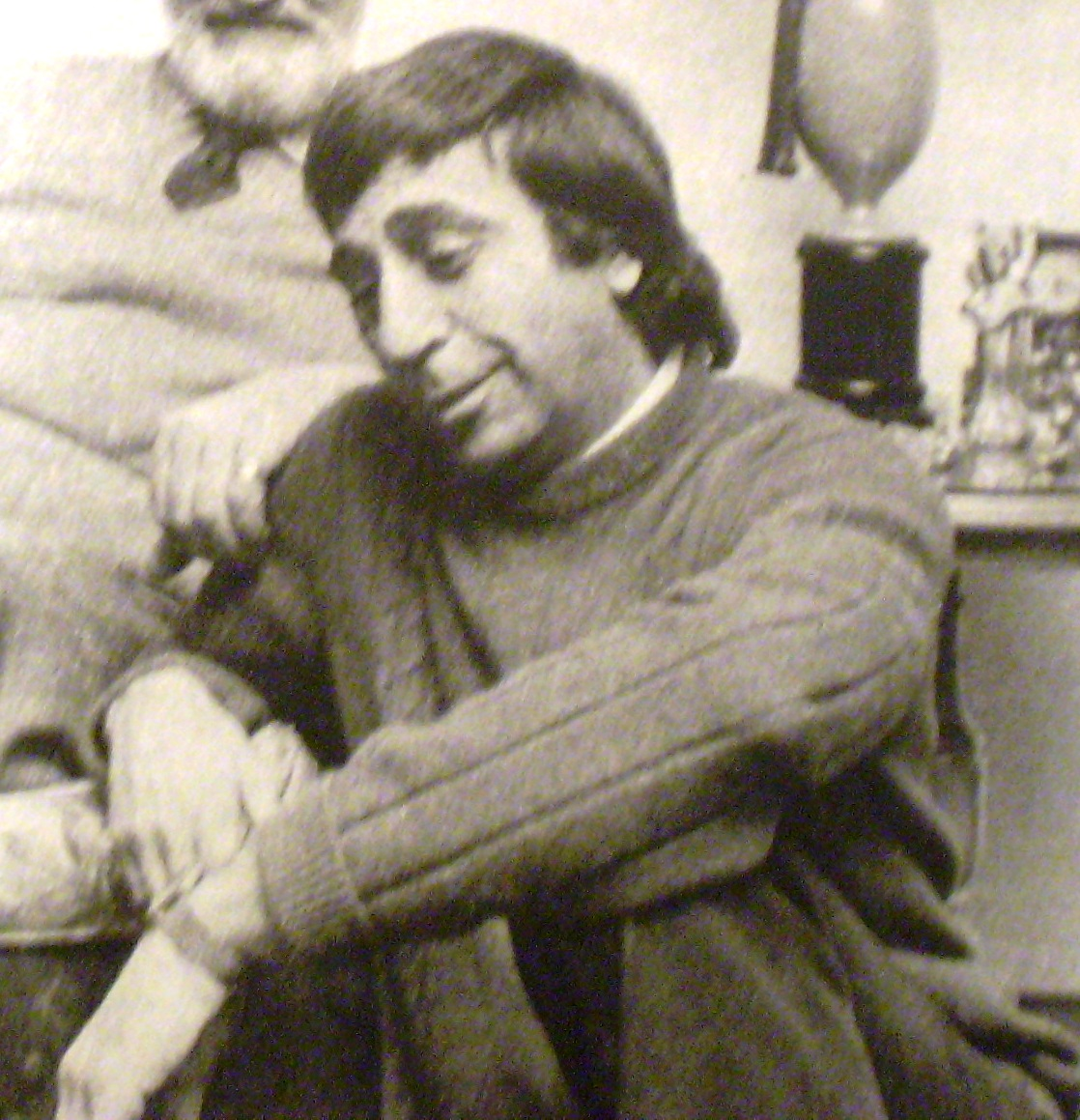 El actor cómico Joe Rígoli